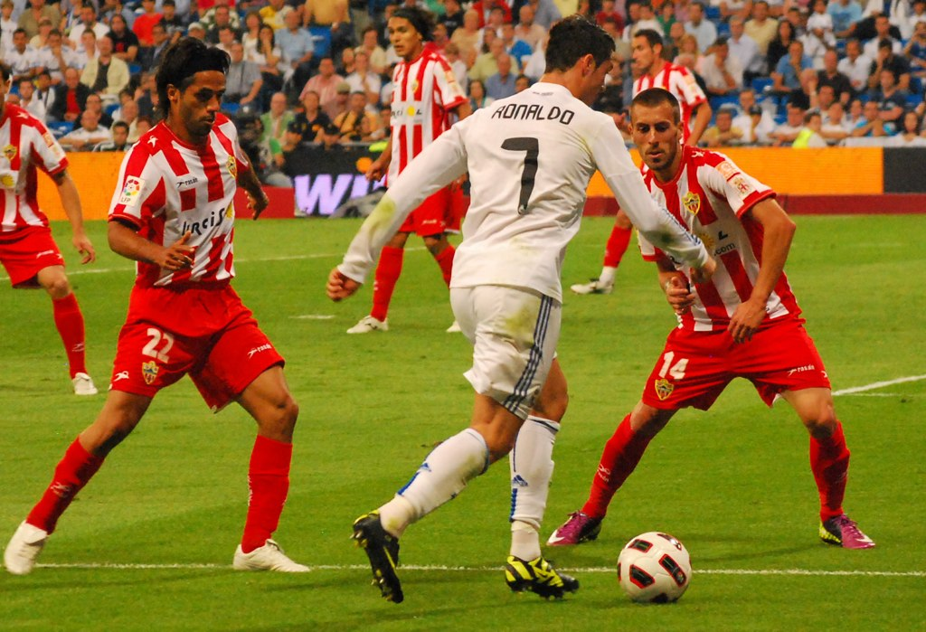 Cristiano Ronaldo face à Antonio Luna Rodríguez et Fabián Vargas lors d'un match entre le Real Madrid et l'UD Almería.